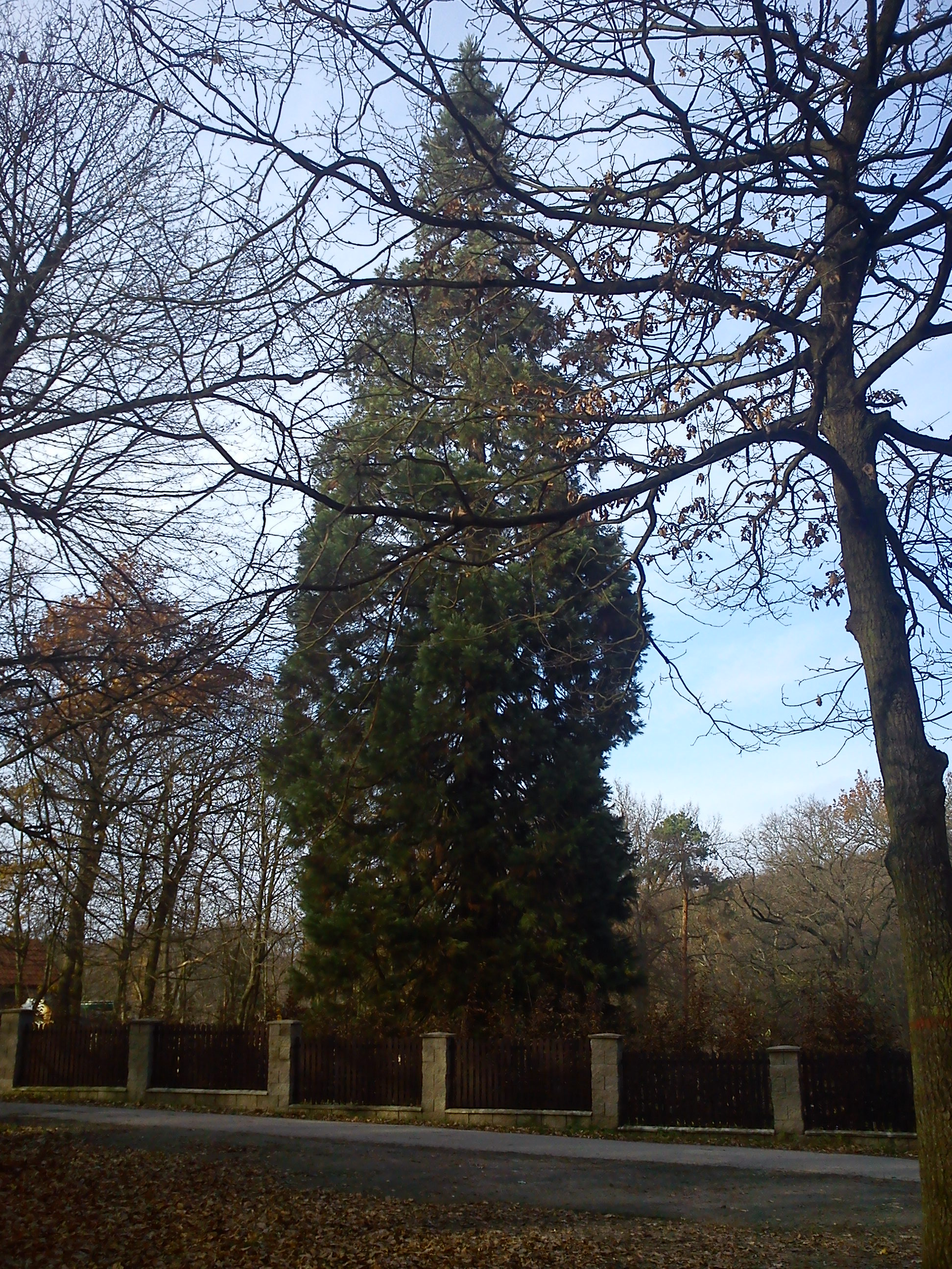 sekvojovec obrovský u hájenky